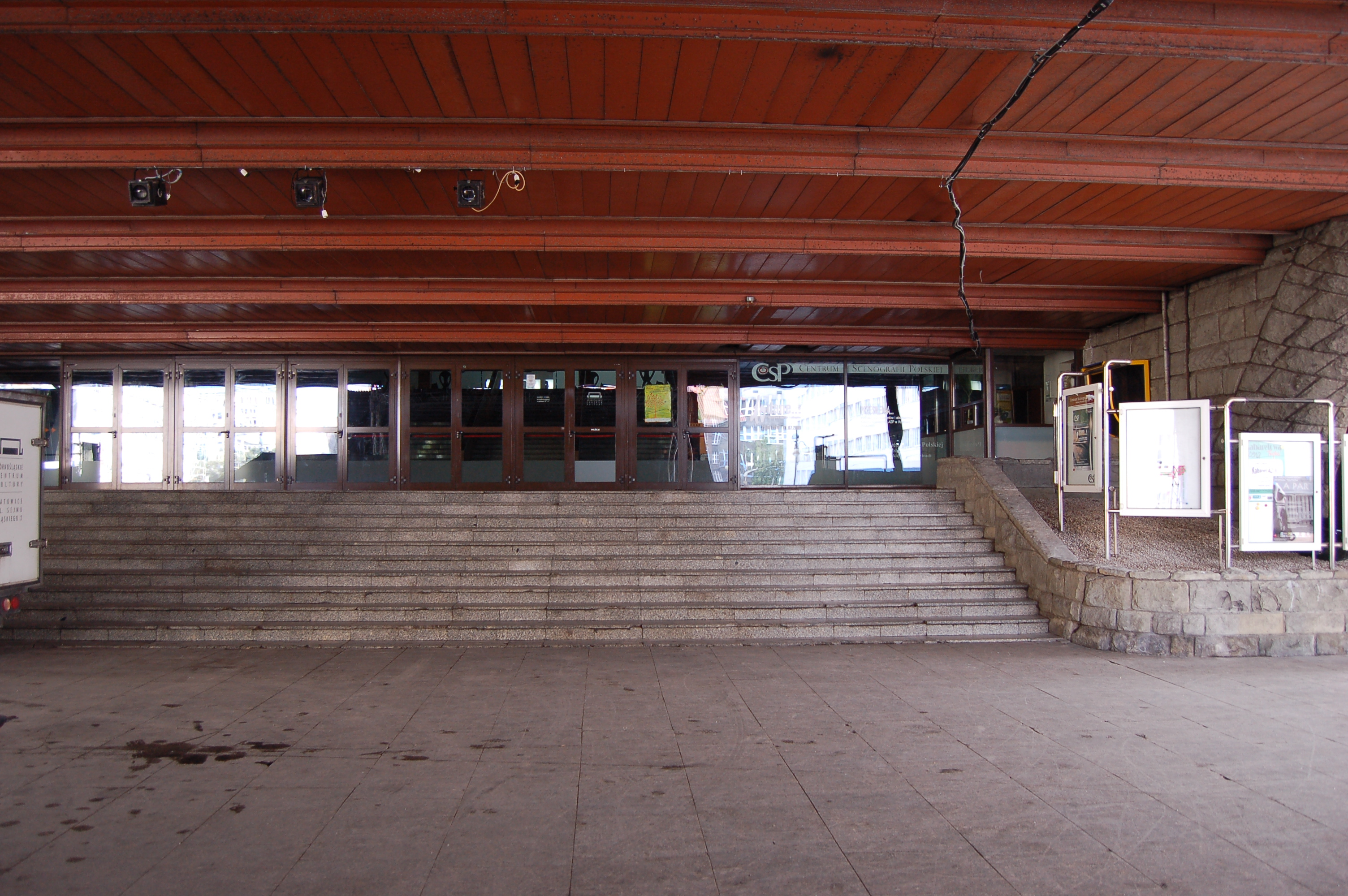 Katowice Plac Sejmu Śląskiego. Górnośląskie Centrum Kultury (od 1 lipca 2010 - Centrum Kultury Katowice im. Krystyny Bochenek). Upper Silesian Culture Center